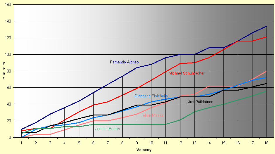 A 2006-os F1-szezon első hat helyezett versenyzőjének pontdiagramja